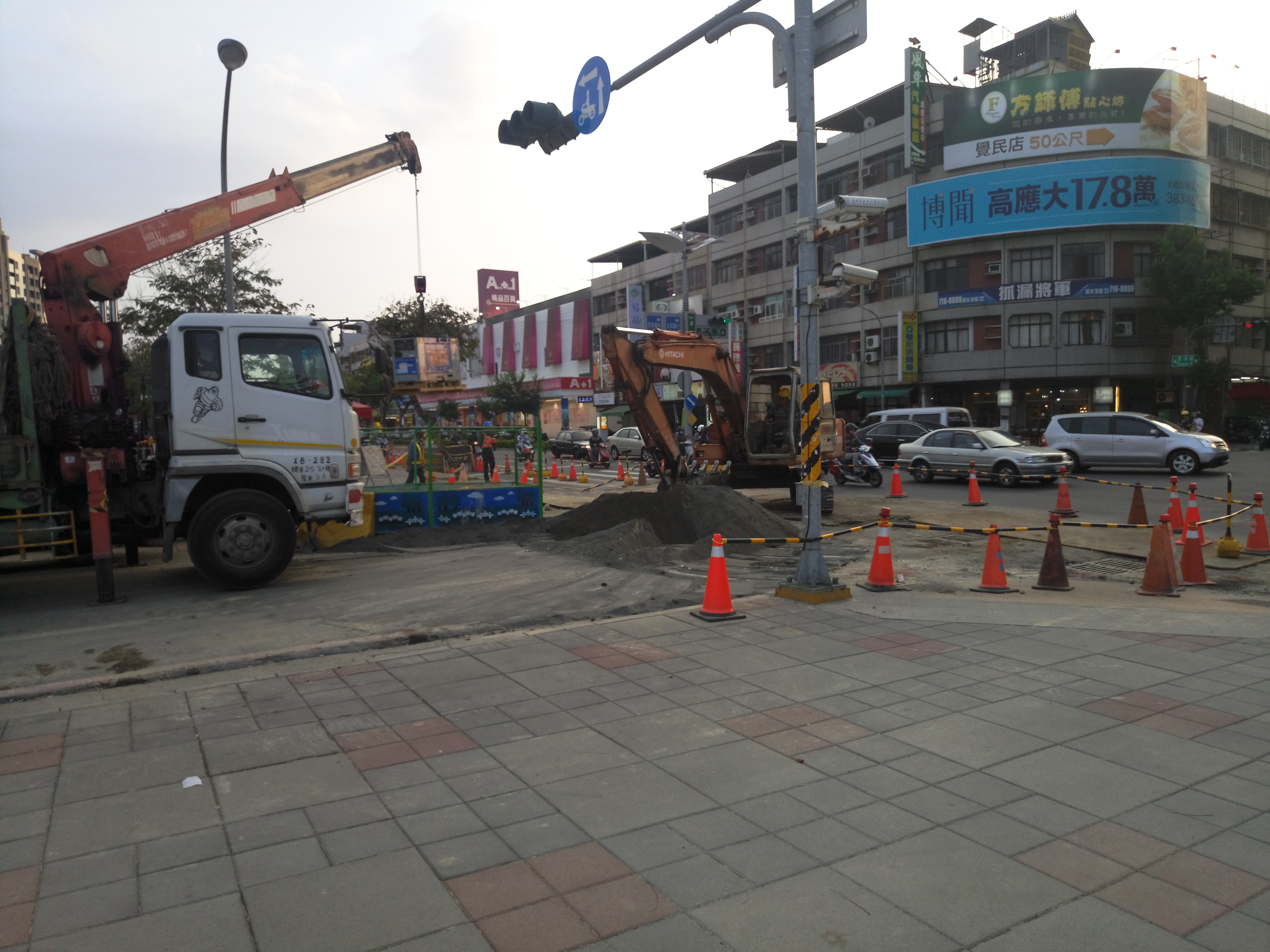 2017年3月17日高雄市三民區下水道氣爆事故